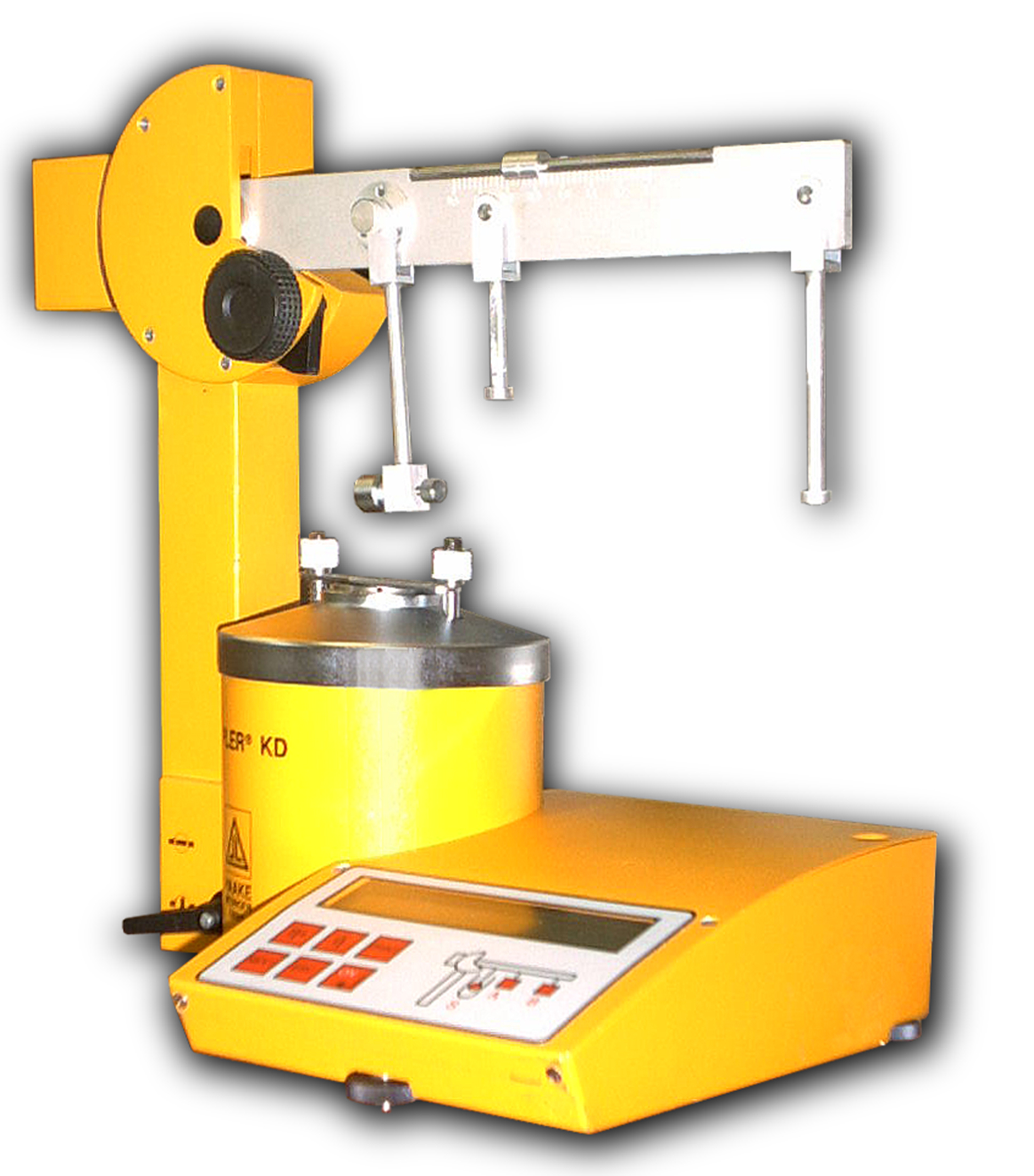 Abbildung eines Viskosimeters, Hopple Prinzip